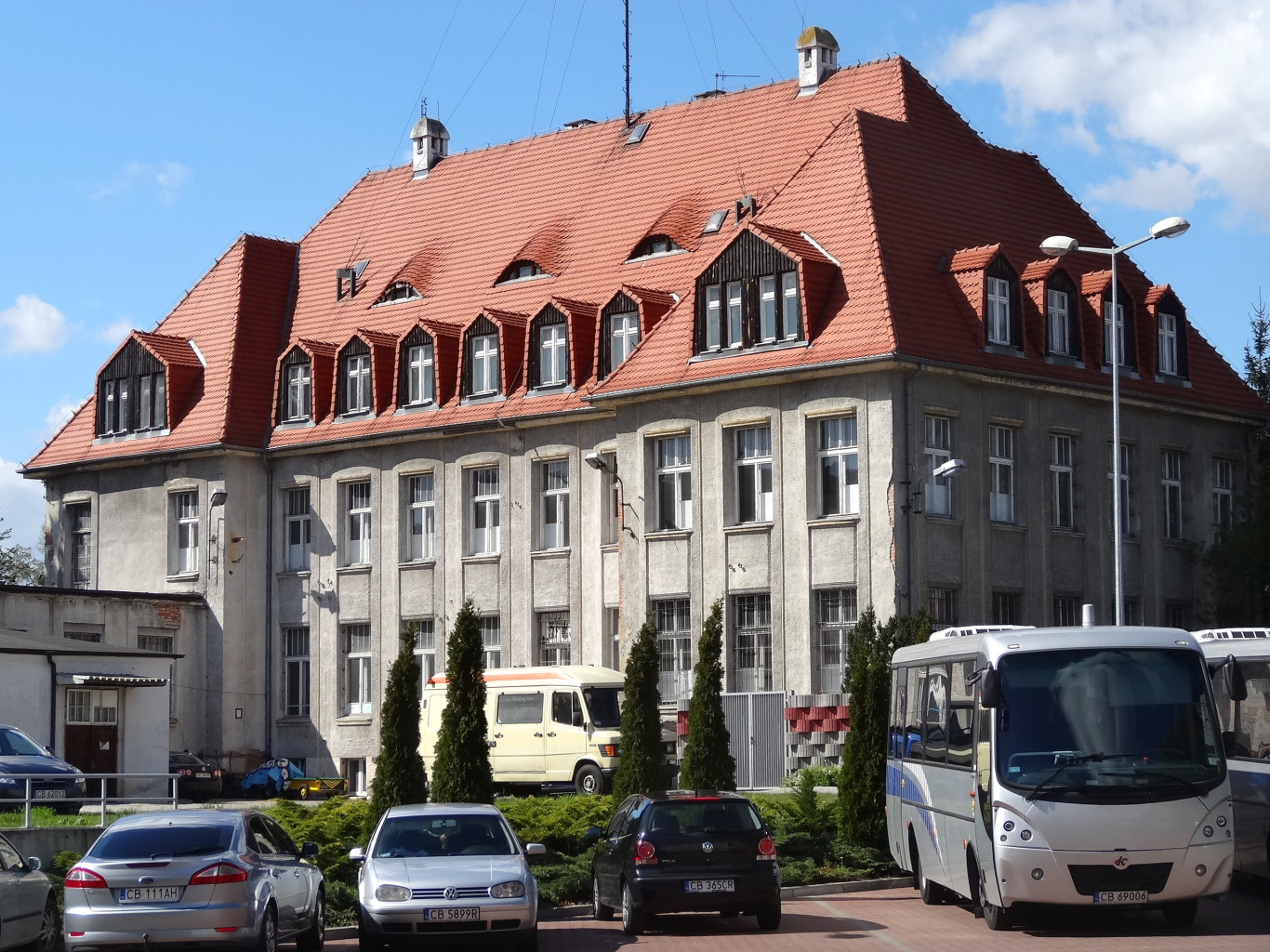 Budynek Oddziału Prewencji Policji w Bydgoszczy przy ul. Chodkiewicza, zbud. 1914 , pierwotnie dom sierot, w okresie międzywojennym Internat Kresowy